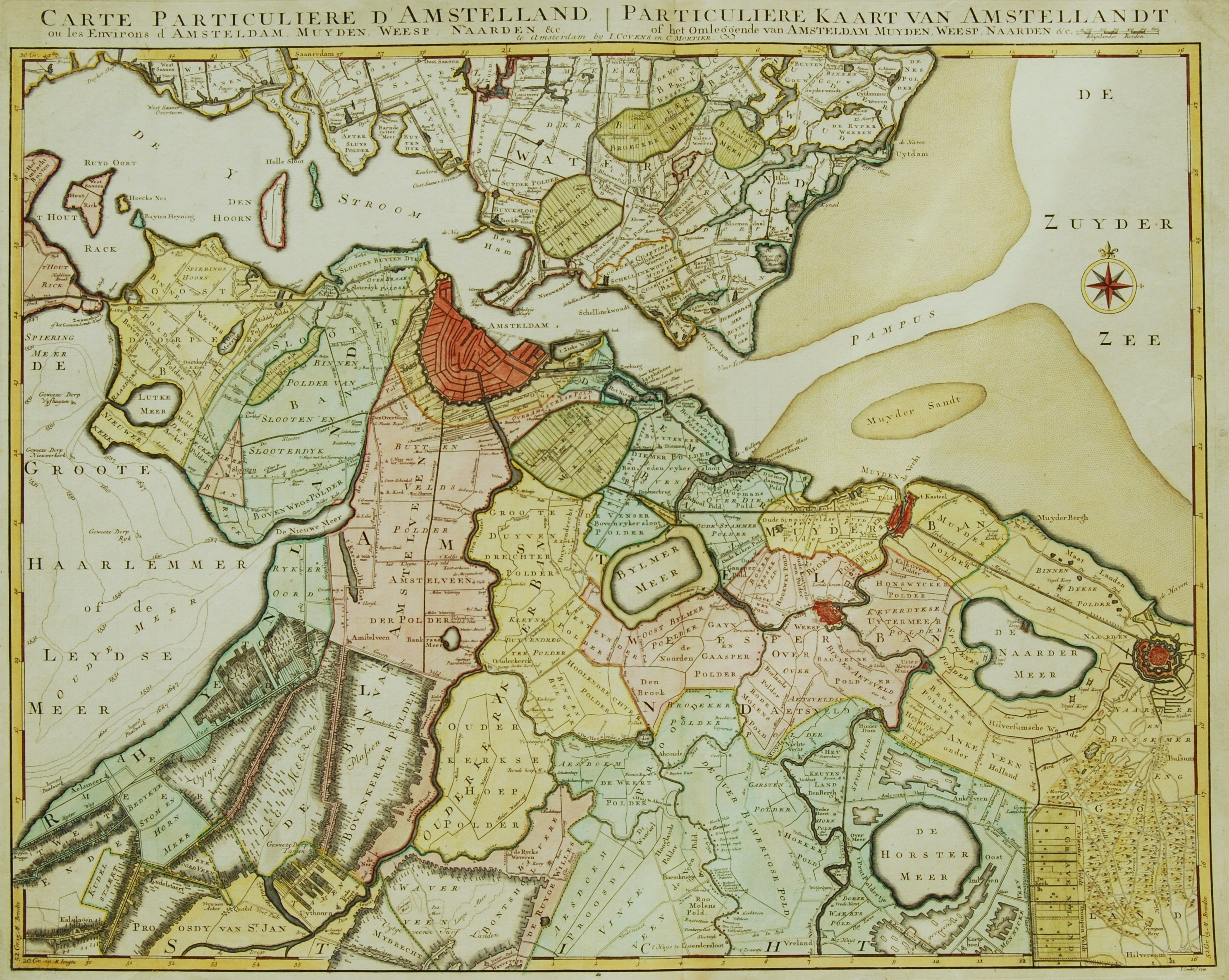 “Particuliere kaart van Amstellandt of het omleggende van Amsterdam, Muyden, Weesp, Naarden &c”, in de tijd met de hand gekleurd, 1749 uitgegeven door Johannes Covens en Cornelis Mortier te Amsterdam.